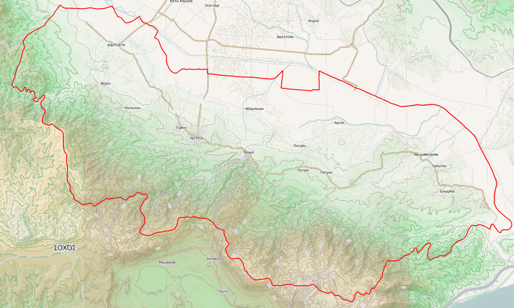 Τοπογραφικός χάρτης του Δήμου Βισαλτίας